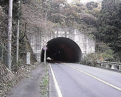 三増トンネル北西側。